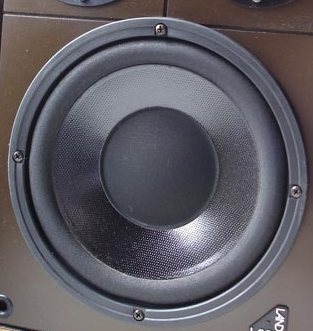 Exemplo de woofer.